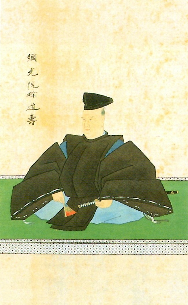 渡辺綱光の肖像。